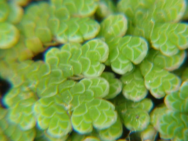 Species: Azolla filiculoides Family: Azollaceae Image No. 2